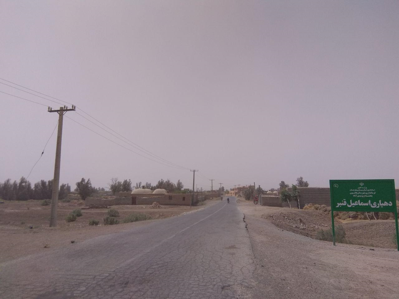 تصویر ورودی روستا